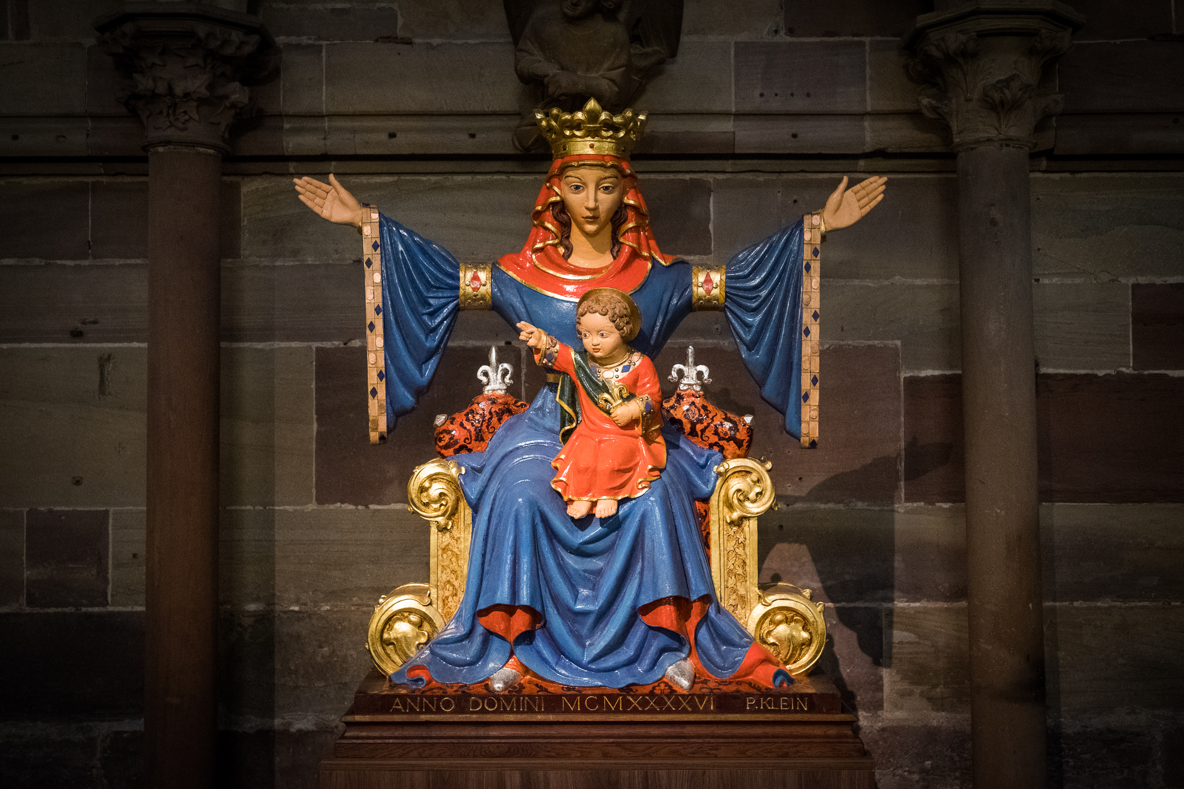 Statue en bois polychrome de la Vierge orante (Symbole de la ville libre Strasbourg) 1946.